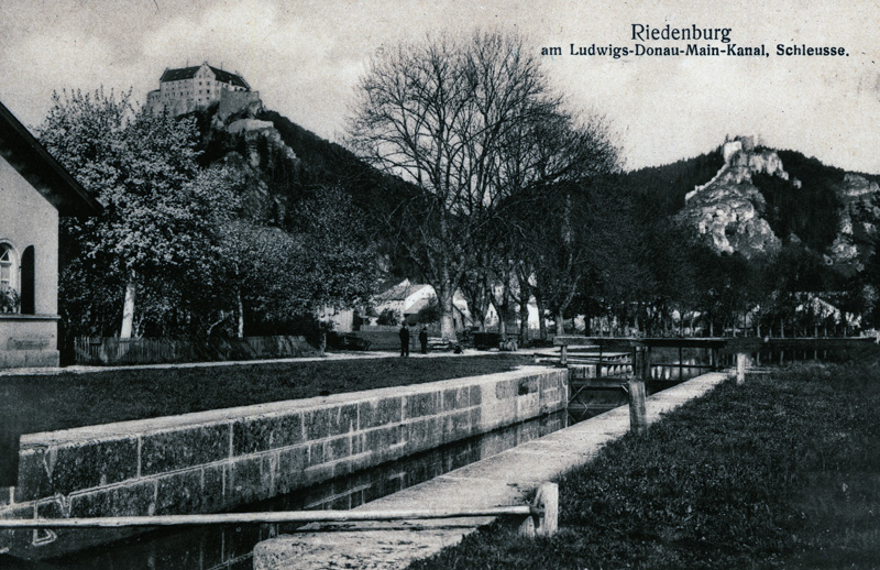 Schleuse 7 des Ludwig-Donau-Main-Kanals in Riedenburg